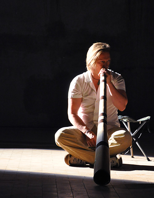 Hangklang spielt Didgeridoo in der Malzfabrik Berlin 2010